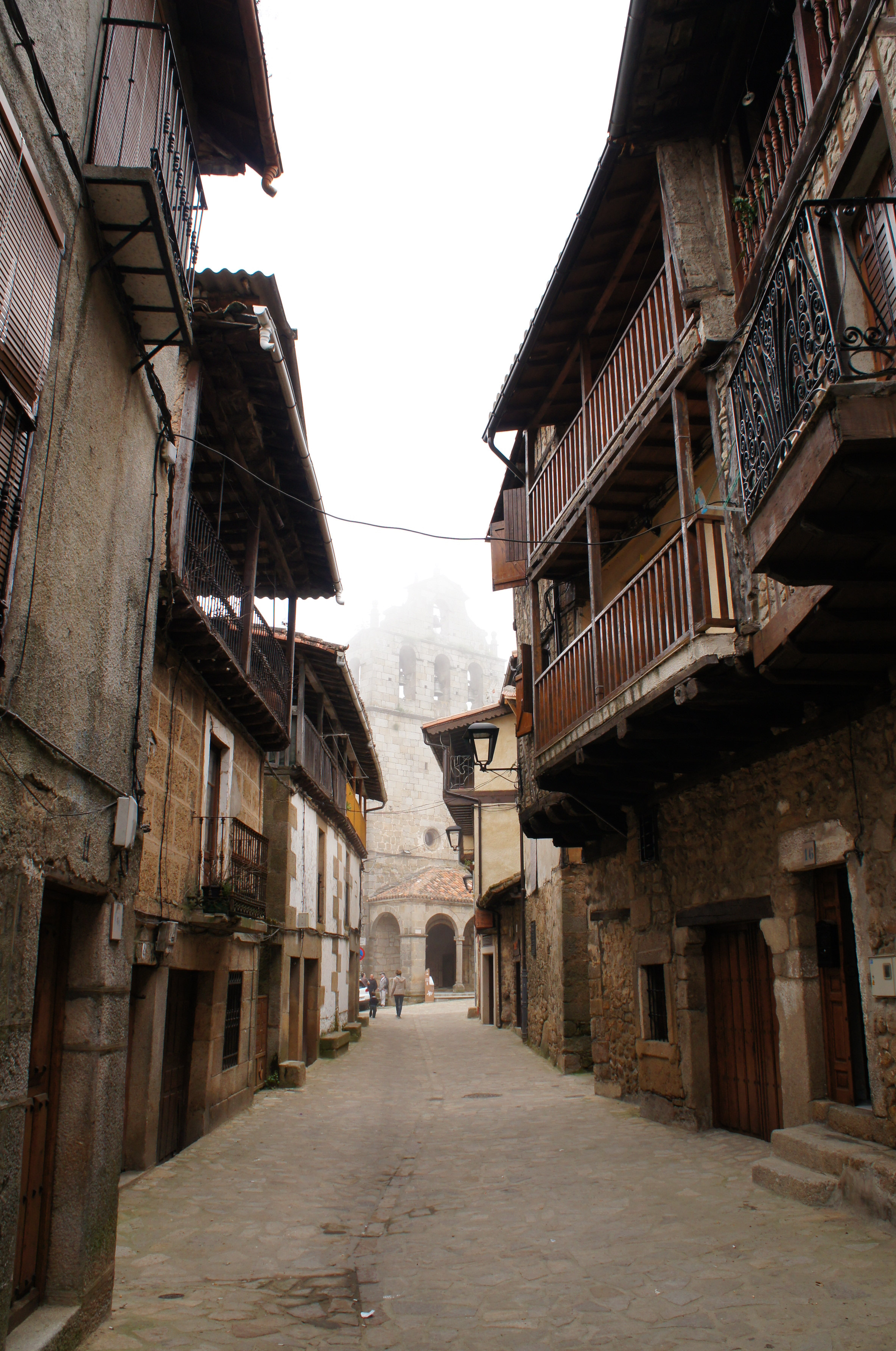 San Martín del Castañar, provincia de Salamanca